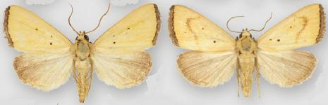 Marimatha tripuncta male (right) female (left)